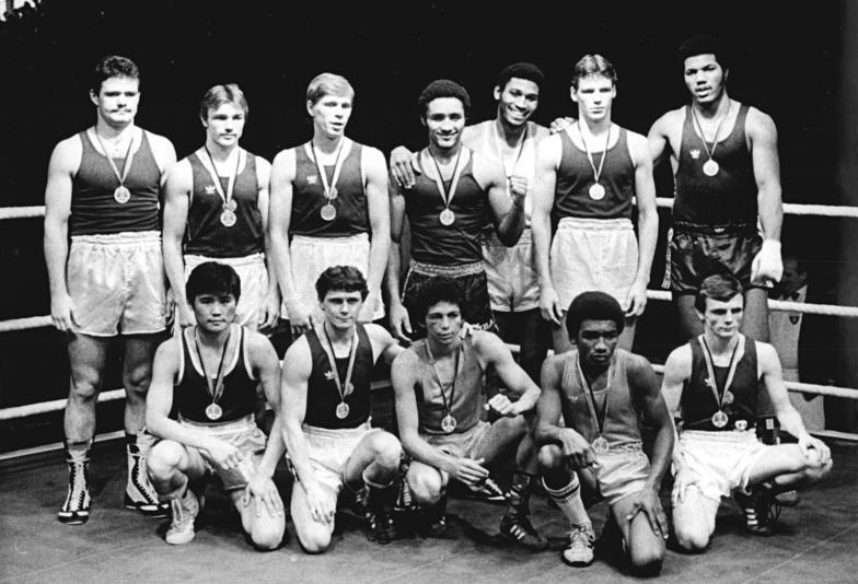 ADN-ZB Lehmann 12.3.83 Halle: XII. Internationales Boxturnier um den Chemiepokal - Die Pokalsieger: obere Reihe vlnr Petr Philipp (DDR, Schwer), Siegfried Mehnert (DDR, Halbwelter), Ronald Poye (DDR. Welter), Jorge Guzman (Kuba, Halbmittel), Pablo Romero (Kuba, Halbschwer), Henry Maske (DDR, Mittel), Jorges Gonzales (Kuba, Superschwer), u.R. vlnr Nergüin Enkhbat (MVR, Leicht), Franz Rauschning (DDR, Feder), Manuel Vilches (Venezuela, Bantam), Jesus Pool (Venezuela, Fliegen), Robert Marx (DDR, Halbfliegen).